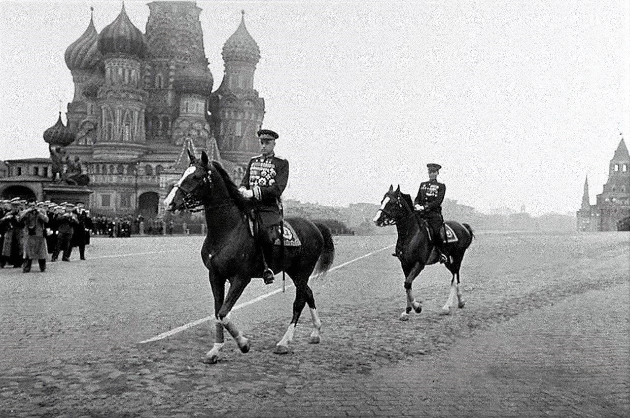 Командующий парадом Маршал Советского Союза К.К. Рокоссовский